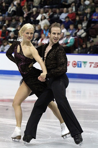 Тарра Харви и Кейт Ганьон на 2011 Skate Canada International